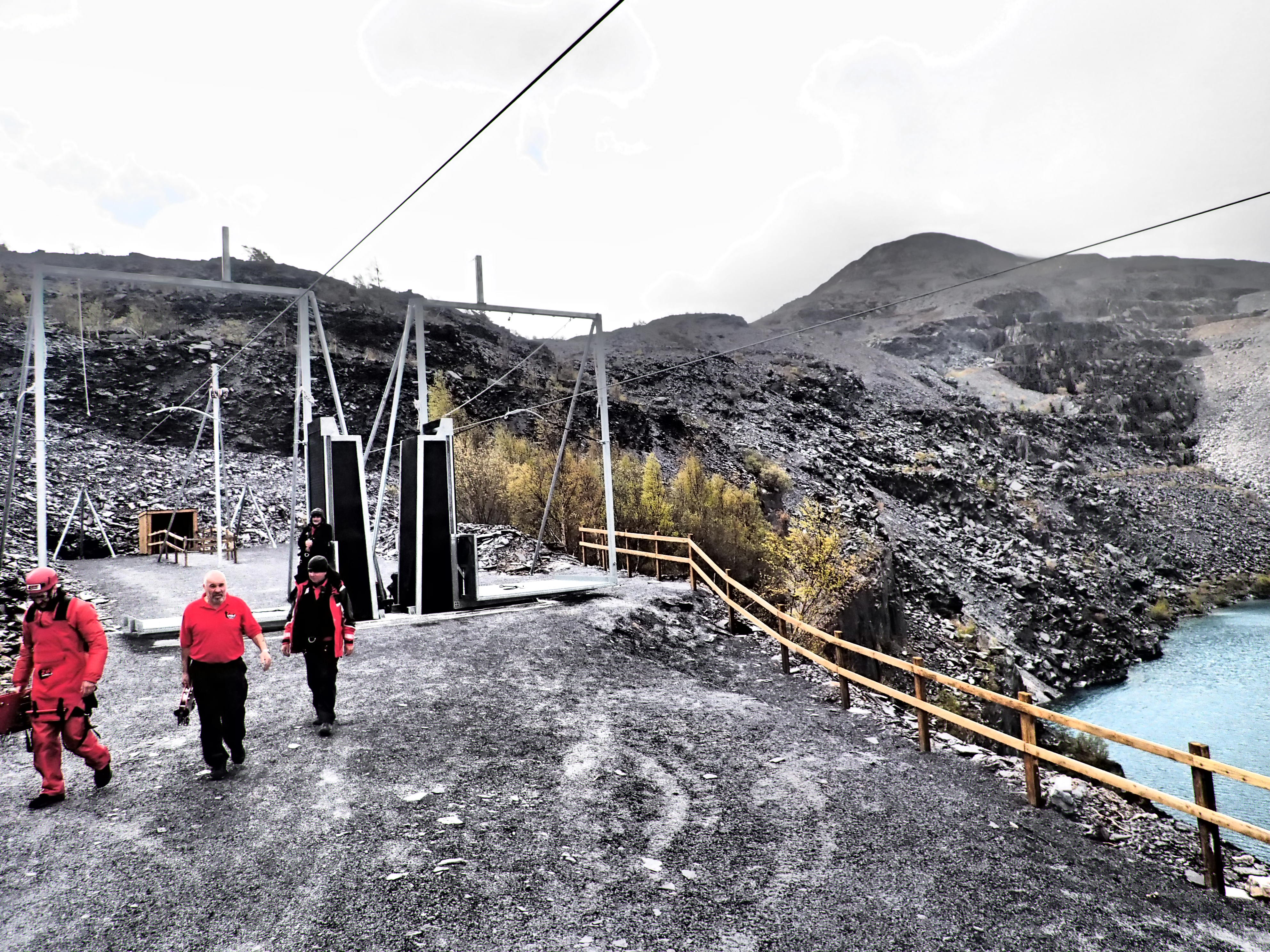 Zip World, Penrhyn Quarry, Bethesda, Bangor Gwynedd